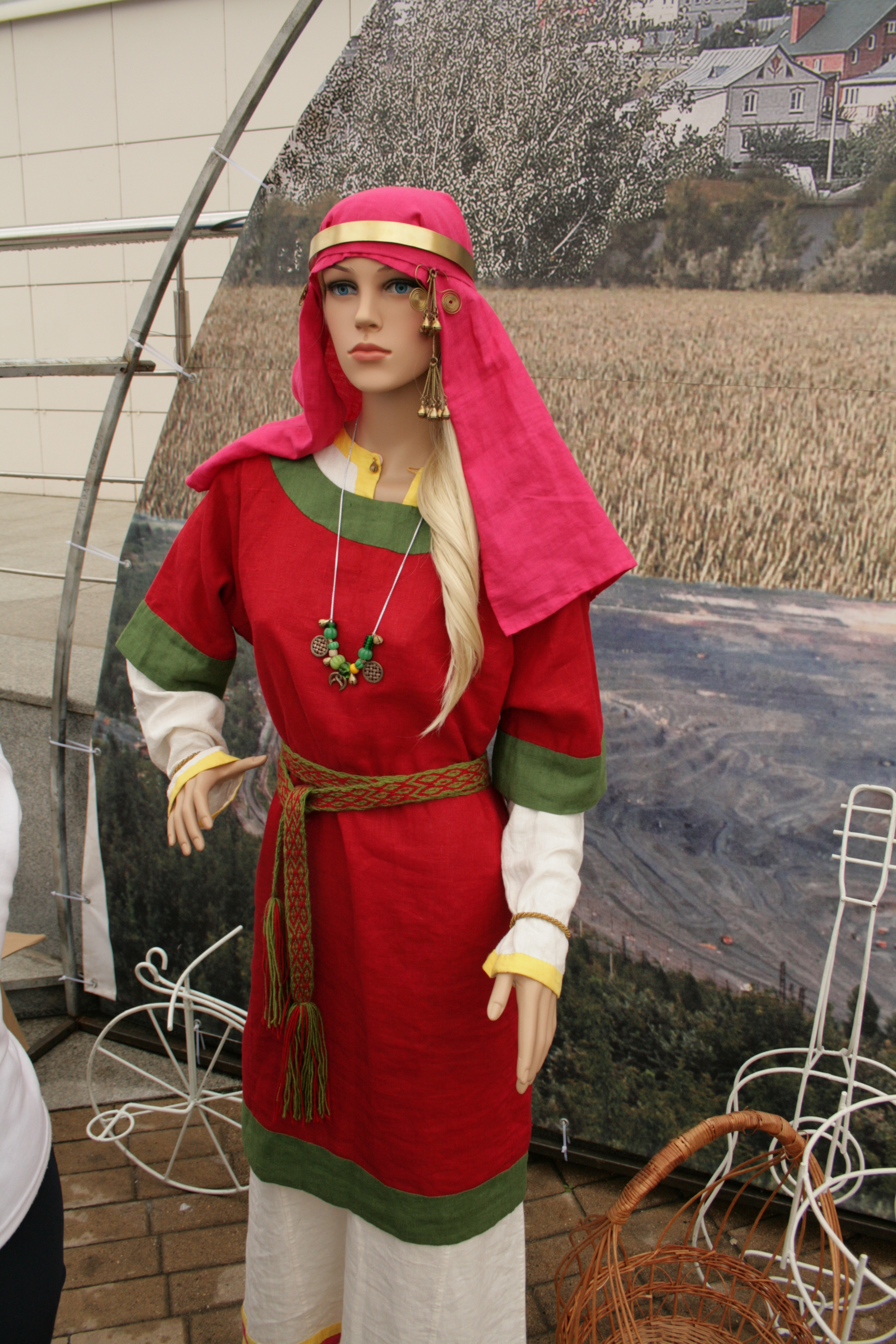 Фестиваль-ярмарка «Белгородская слобода», 2013. Опыт реконструкции наряда северянки. Город Губкин.